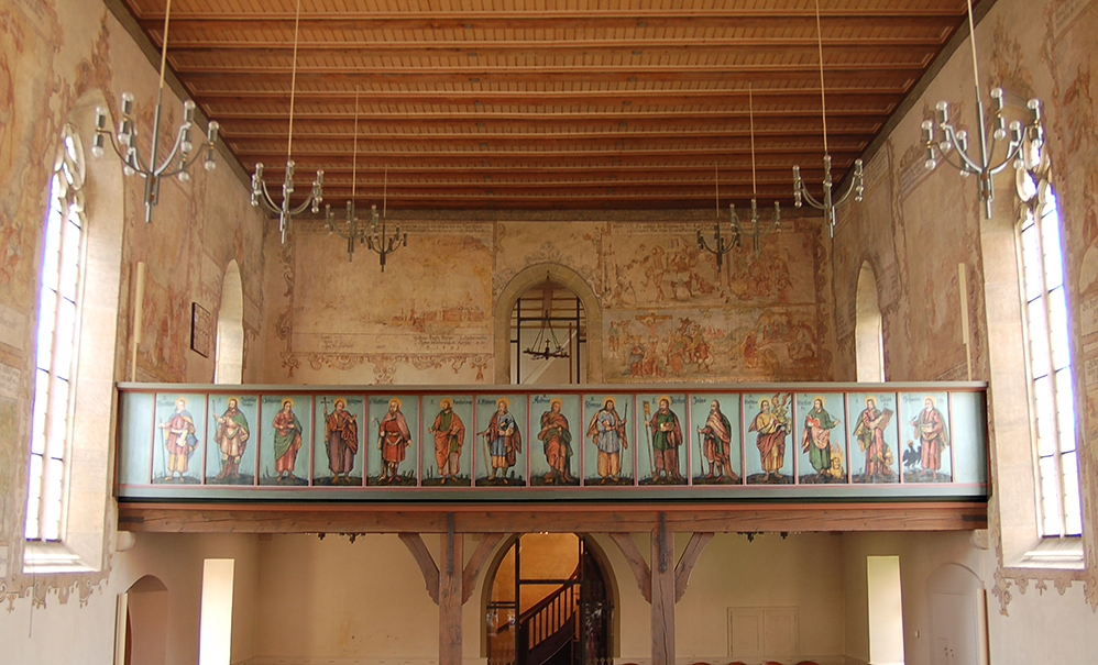 Empore mit Heiligenbildern an der Brüstung in der Bissinger Kilianskirche